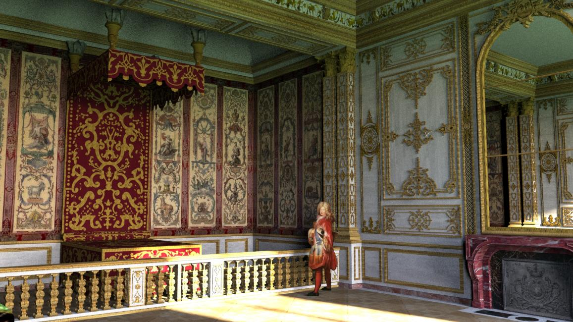 Restitution 3D de la chambre de parade de Monseigneur au château-neuf de Meudon, état vers 1710-1711. Franck Devedjian et Hervé Grégoire, 2014.